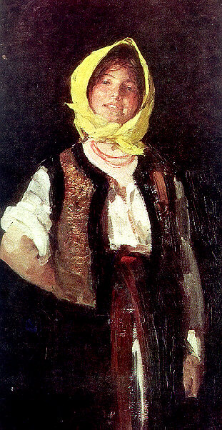 Țărancă voioasă, ulei pe pânză, 134,5x65cm, nedatat, semnat dreapta jos cu roșu: Grigorescu - Galeria de Artă Românească a Muzeului Național de Artă al României.